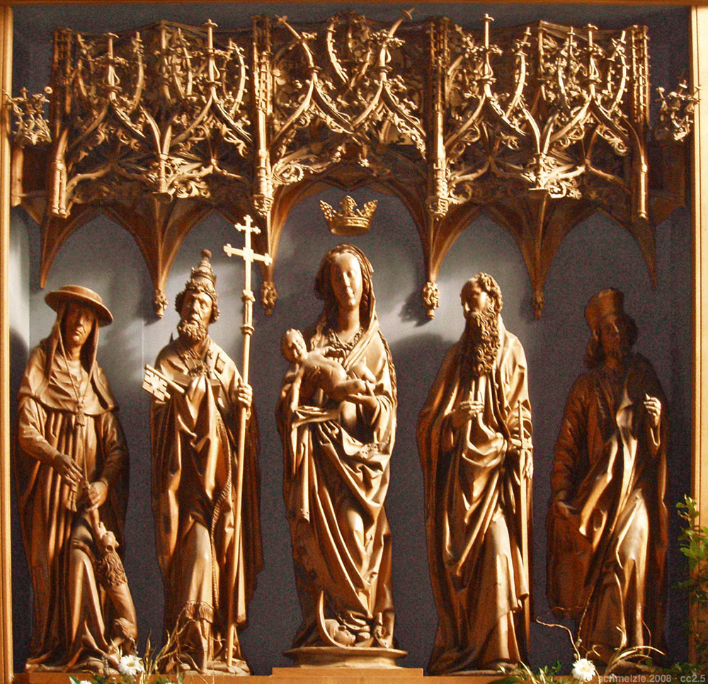 Schnitzaltar um 1500 in der Stiftskirche in Öhringen